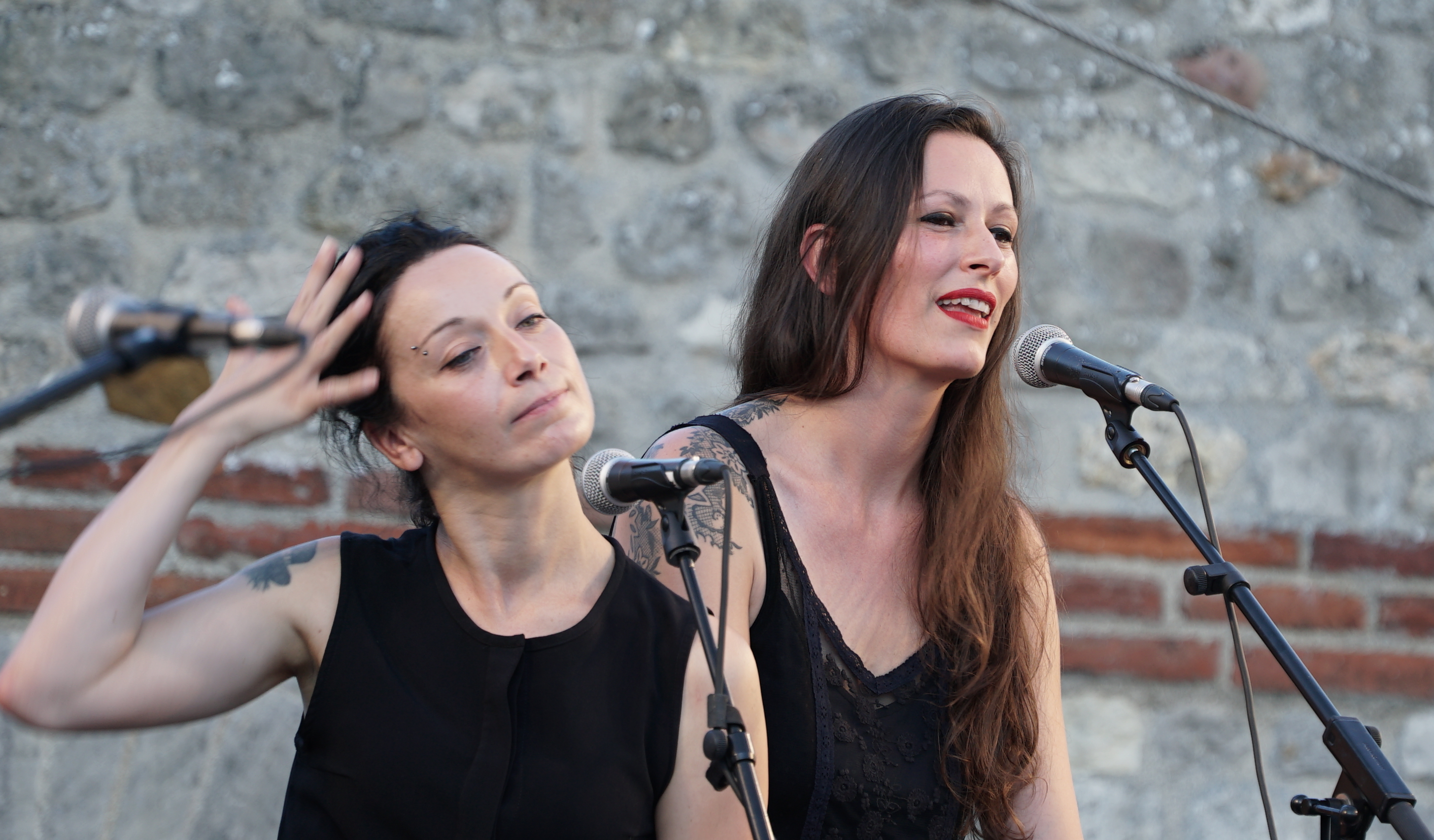 en concert à Reims.